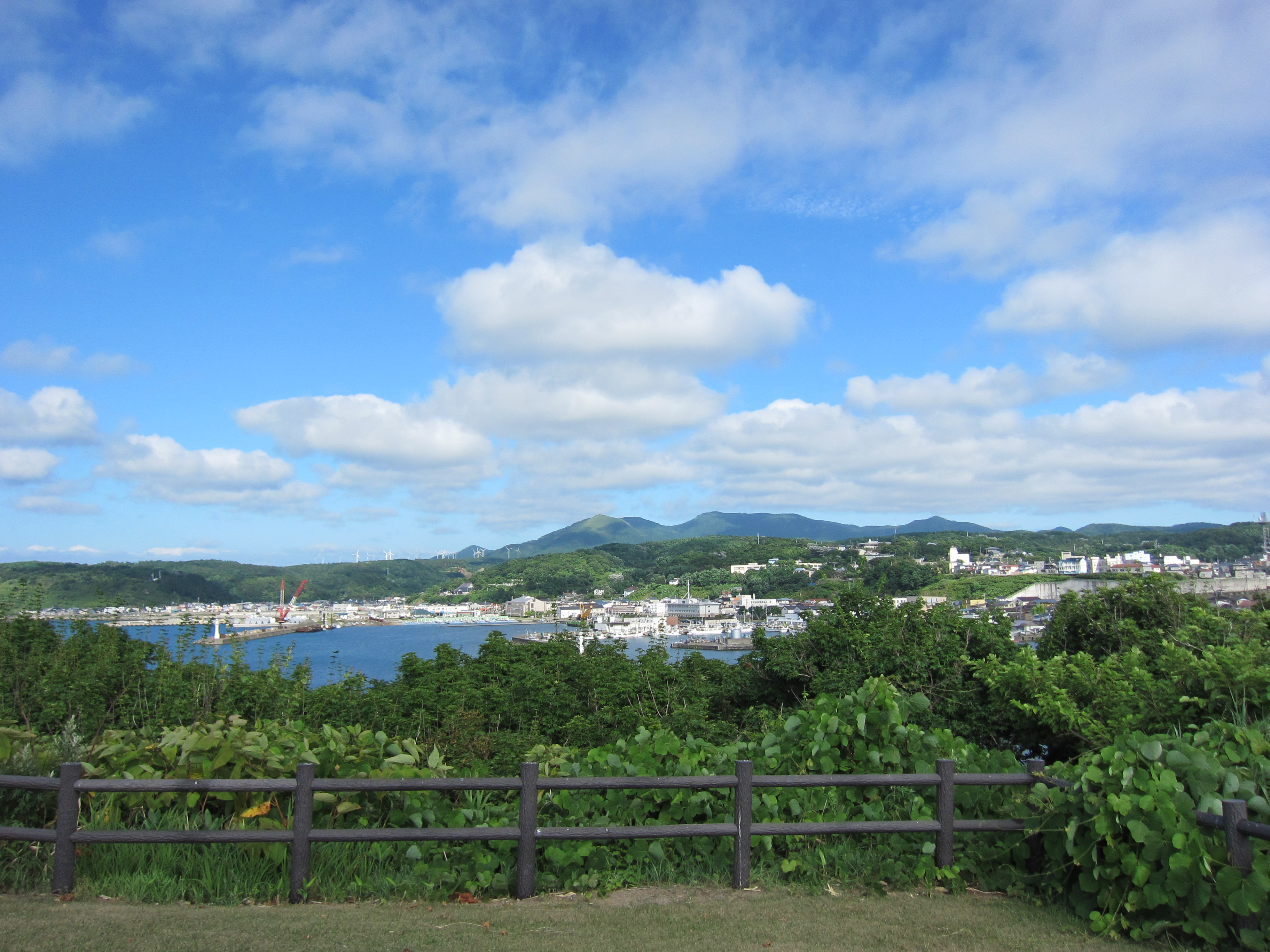 江差町鴎島より中歌方を望む